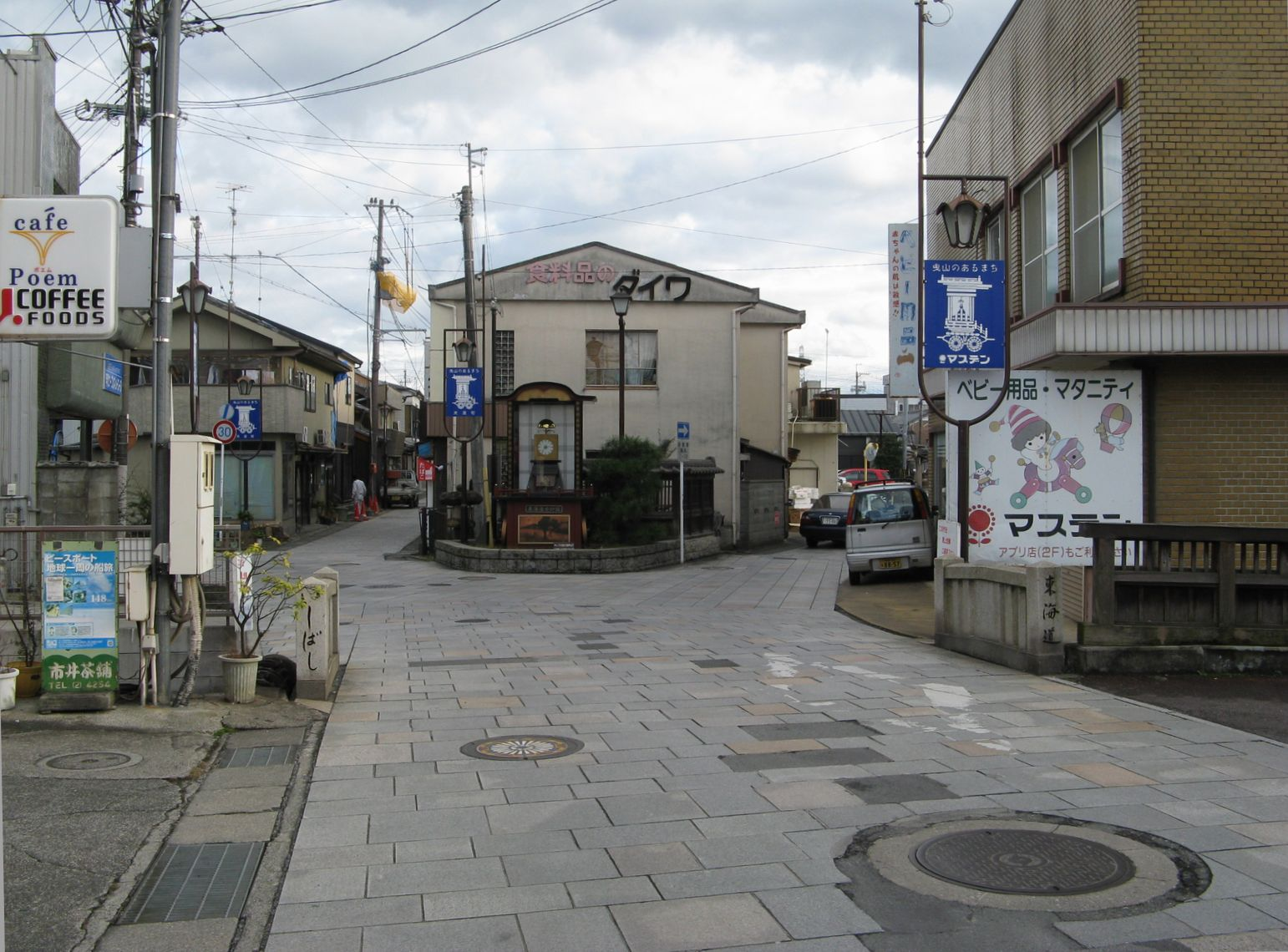 水口石橋駅の駅名の由来ともなった東海道水口宿の「石橋」